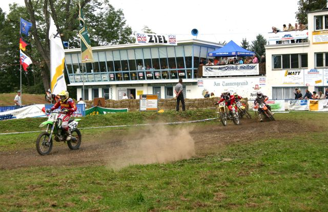 MSV-Rennen_auf_dem_Motocross-Gelände